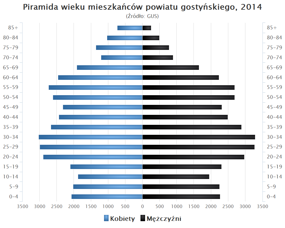 Piramida wieku mieszkańców powiatu gostyńskiego, 2014